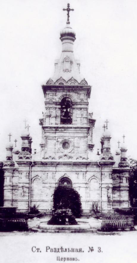 Дореволюційний вигляд Свято-Миколаївської церкви в м. Роздільна